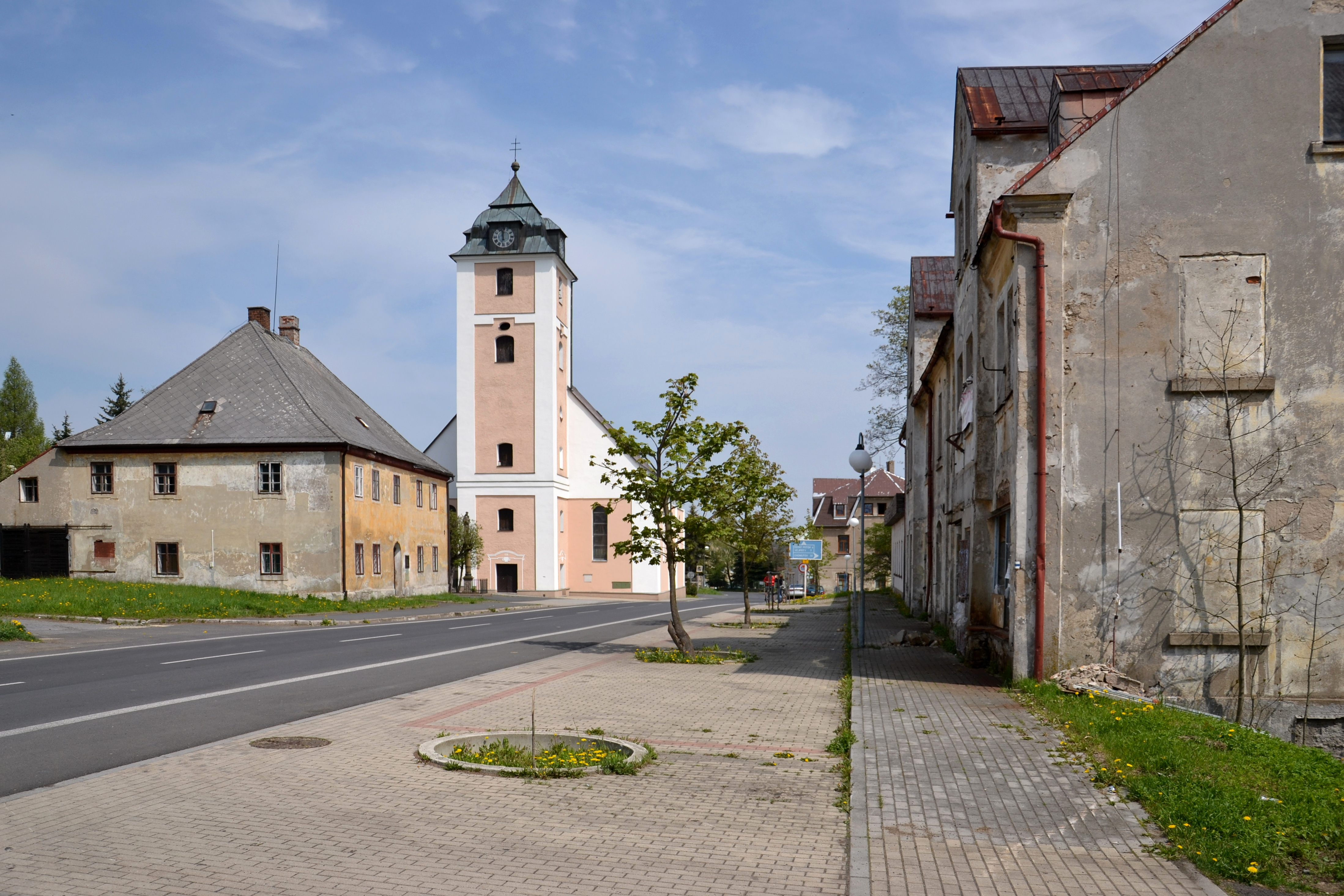 Fara s kostelem svatého Michaela Archanděla